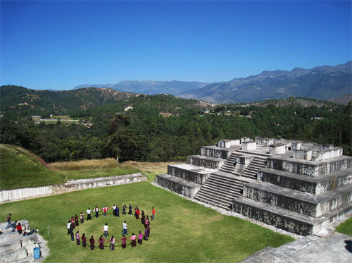 HERMOSA VISTA RUINAS DE ZACULEU